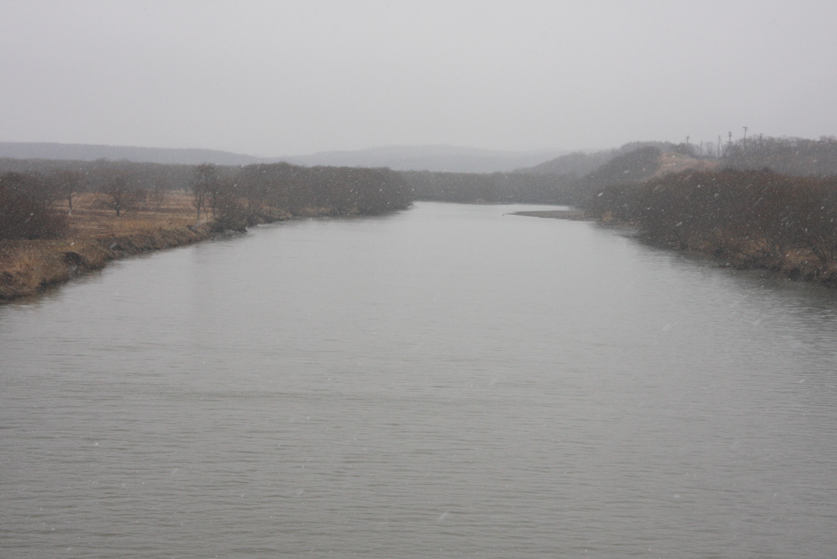 浦幌十勝川 浦幌町